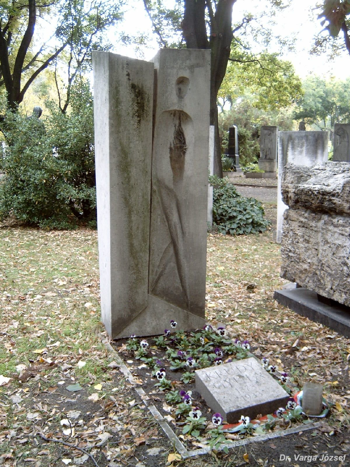 Krúdy Gyla sírja Budapesten. Borsos Miklós (1906–1990) alkotása (1963). Kerepesi temető: 34/2-1-17.